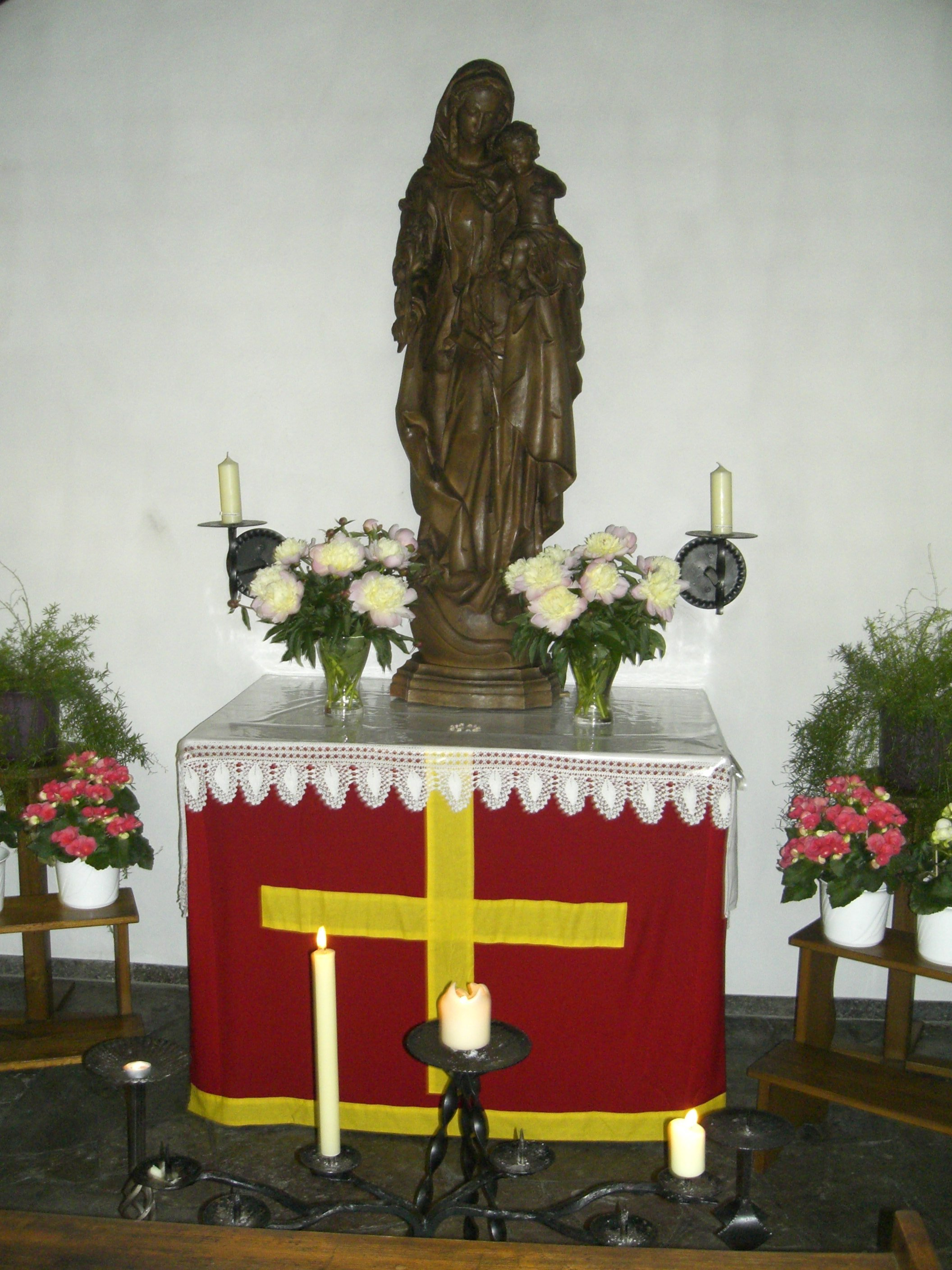 Kapelle in Greßthal von innen.